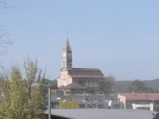 Église Saint-Pierre et Saint-Paul de l'Isle d'Abeau